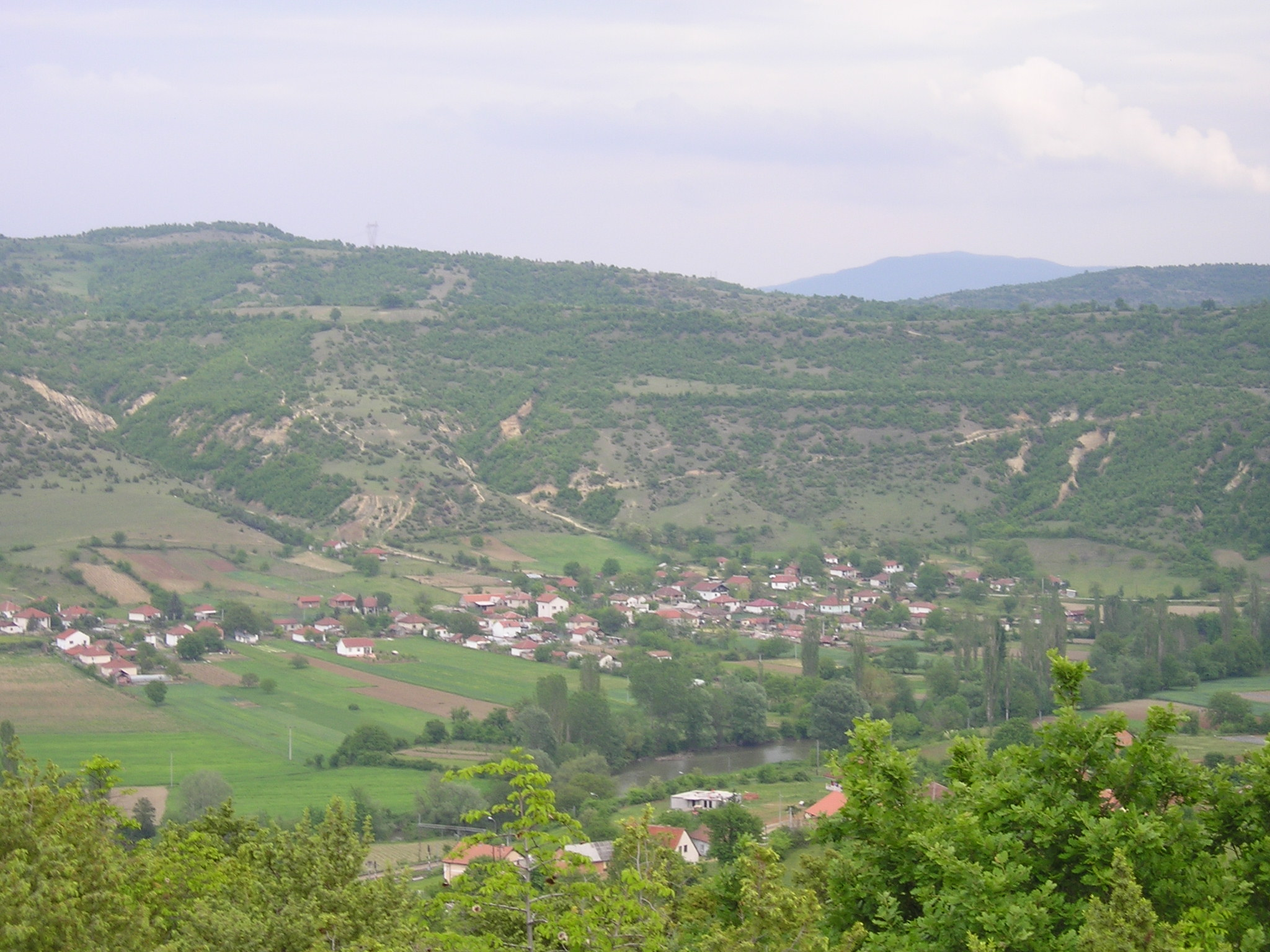 Поглед към селото Пакошево, Република Македония.